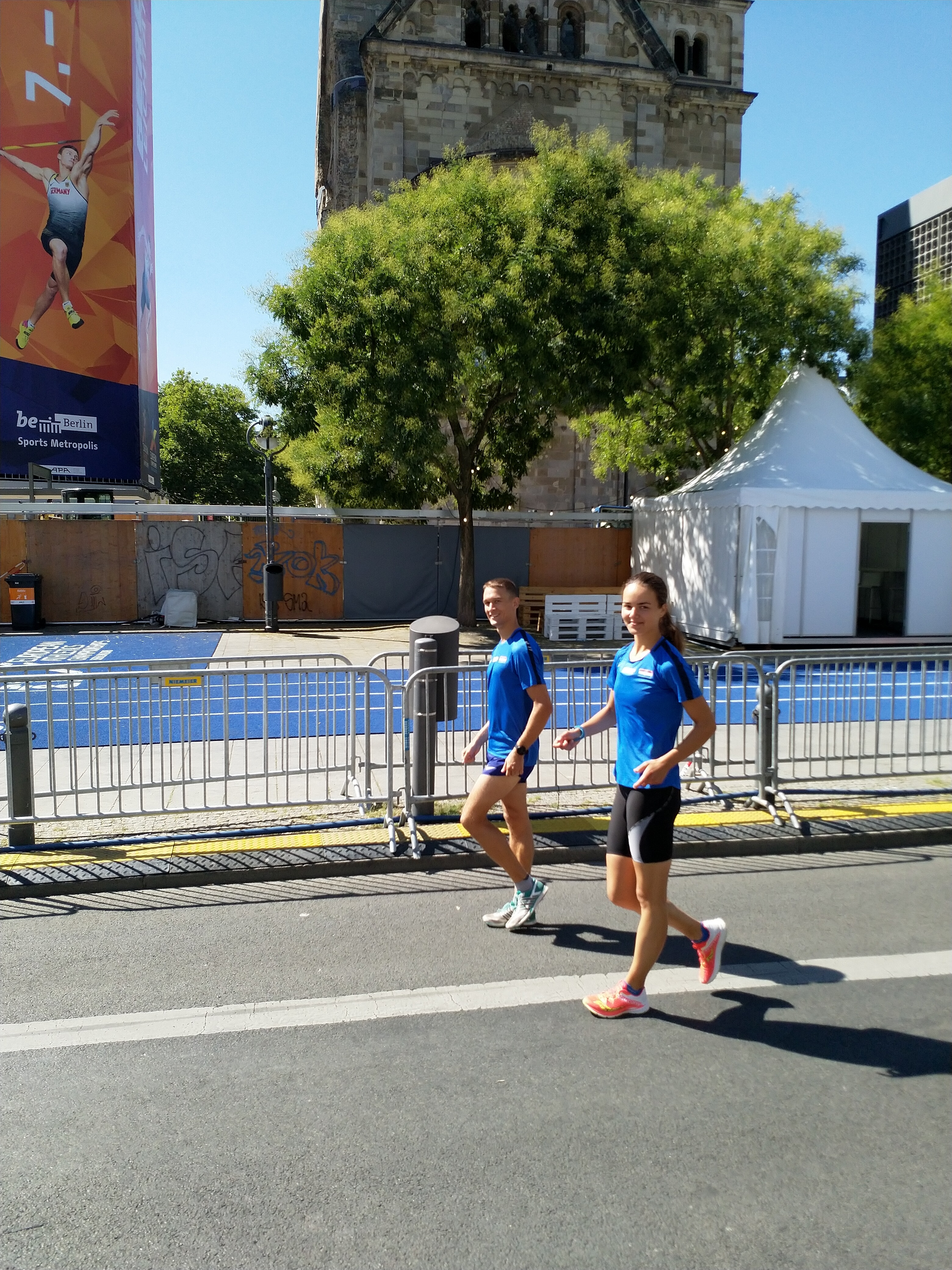 Ivana Renić, Europsko atletsko prvenstvo, Berlin 2018.